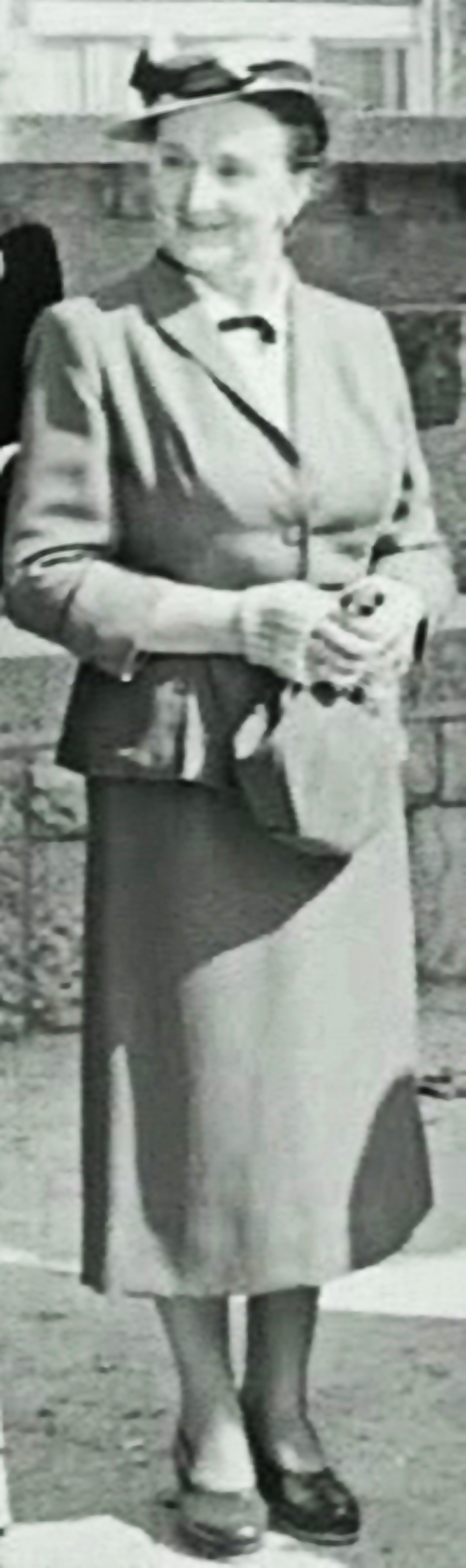 Metka Bučar (1903–1988) Slovensk skådespelare